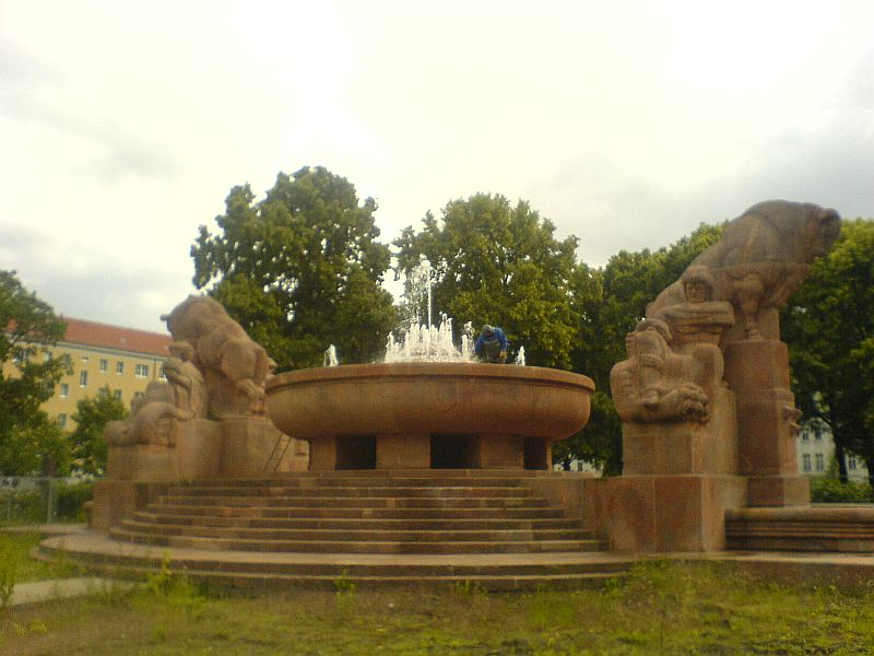 Arbeiten am sanierten Stierbrunnen auf dem Arnswalder Platz in Berlin, am 11. Juni 2009.